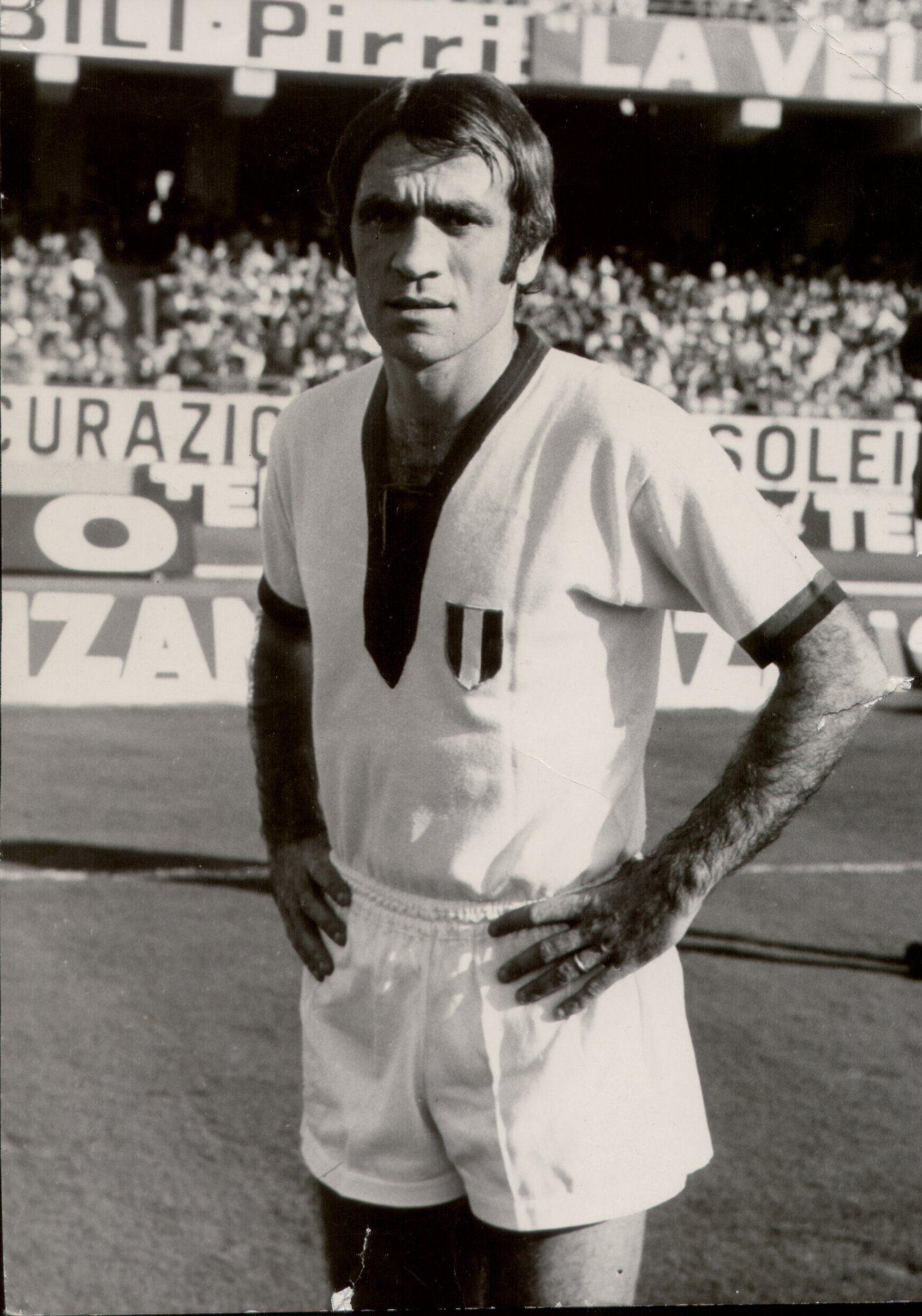 Il calciatore italiano Mario Martiradonna al Cagliari nella stagione 1970-71.